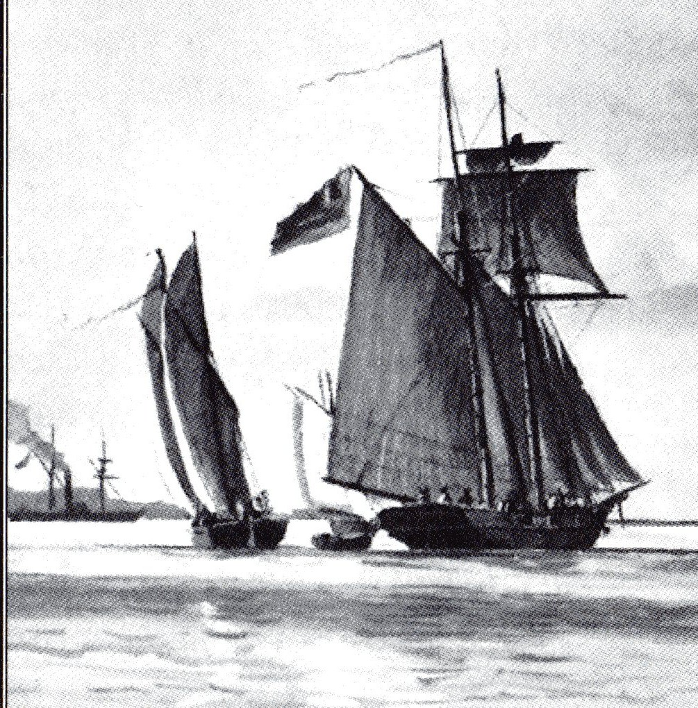 Schoner ELBE (dänisch ELBEN) um 1850. Aussschnitt aus einem Gemälde von Lüder Arenhold von 1906